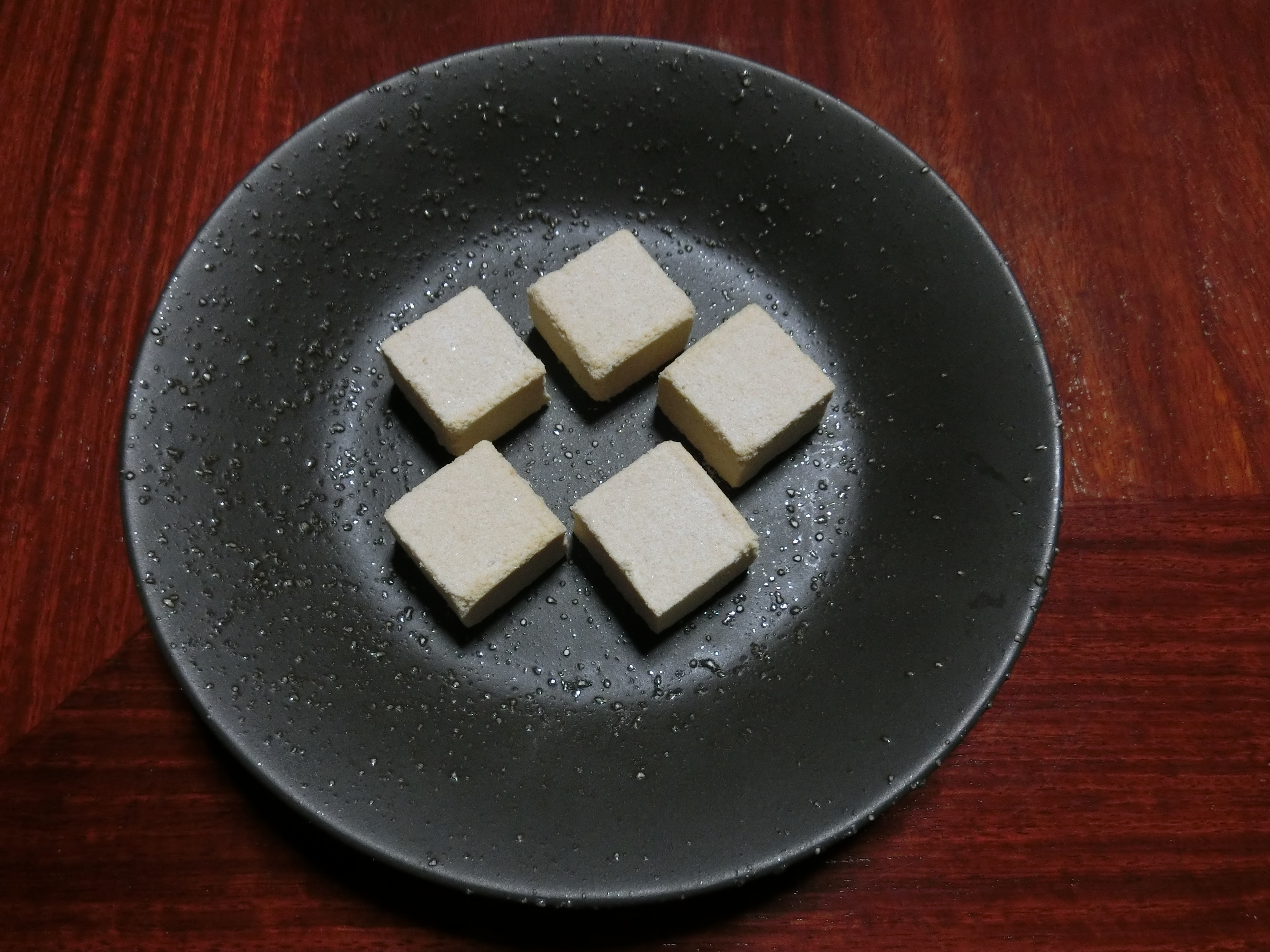 長岡市銘菓、越乃雪